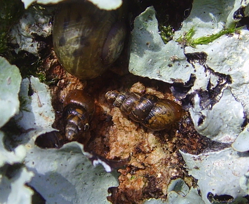 Balea perversa, Penn ar Run (Goulien, Finistère, Bretagne, France)